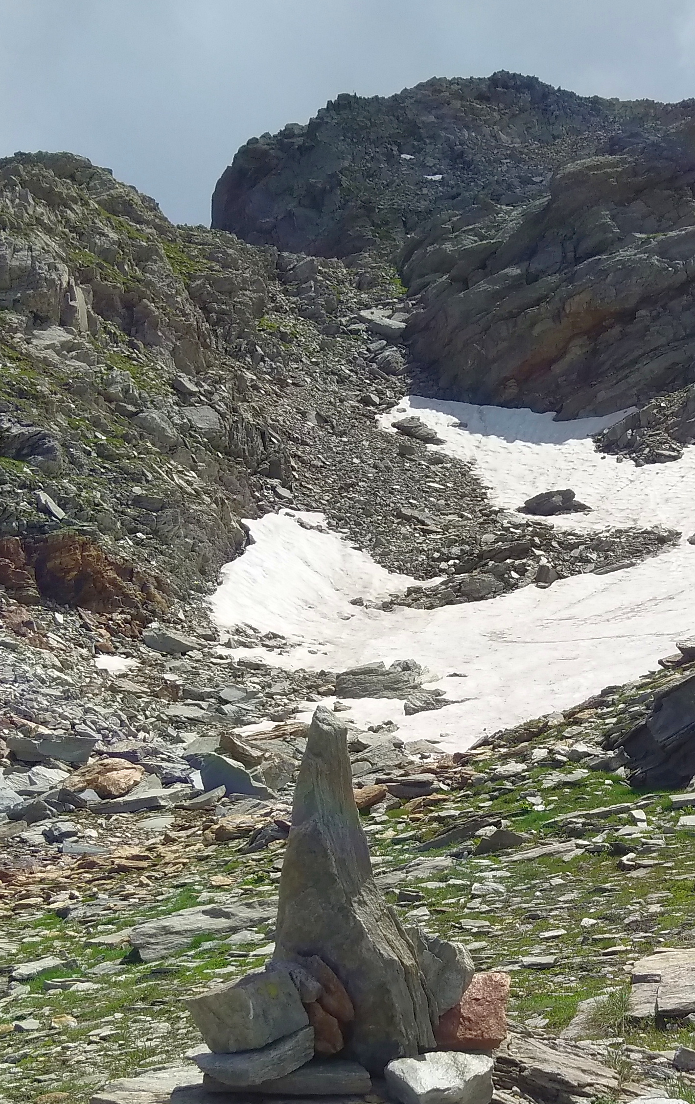 Monte Marzo (Alpi Graie): via di salita da Val Soana